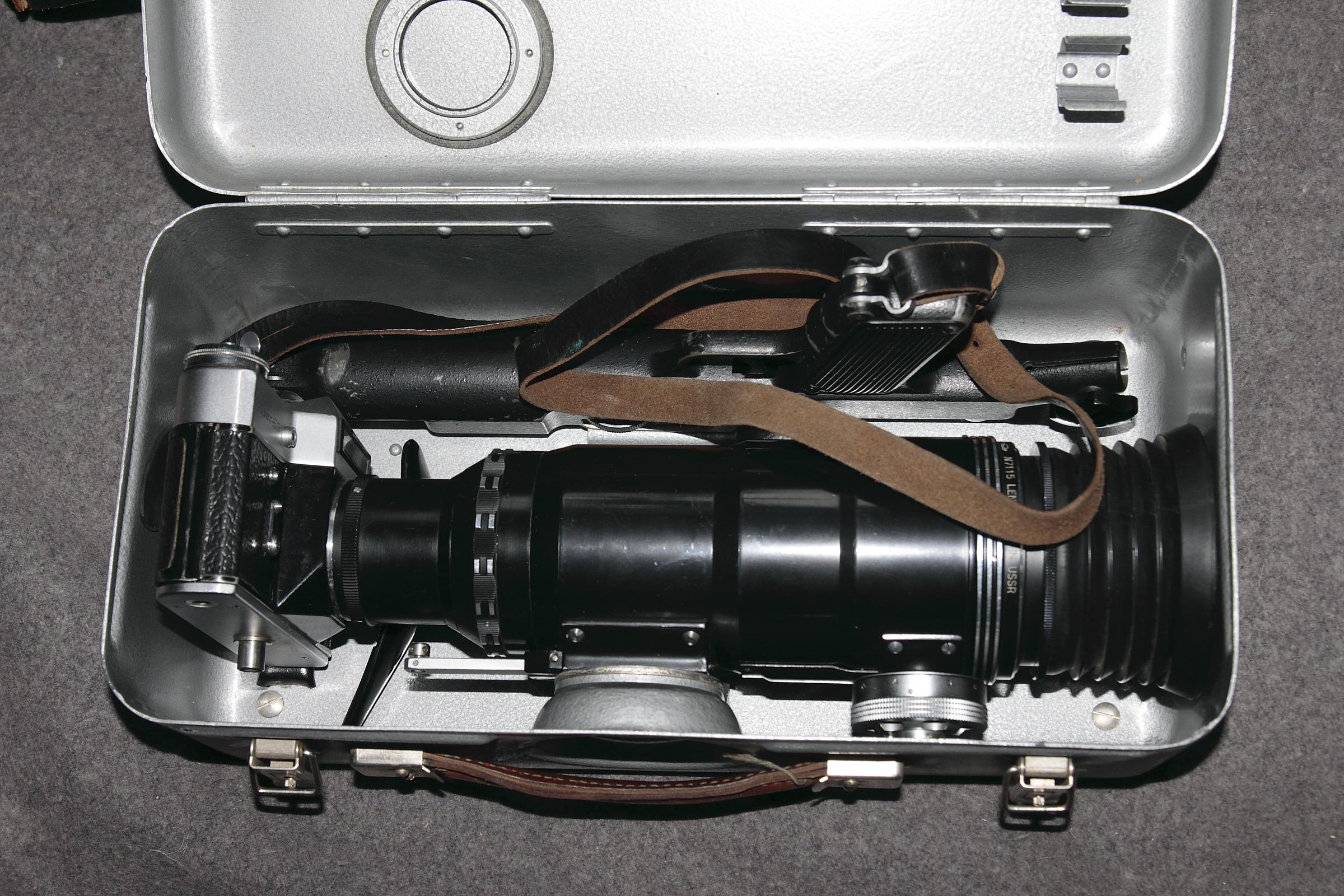 Lustrzanka Zenit FS, przystosowana do współpracy z uchwytem pistoletowym i obiektyw Tair 4,5/300.